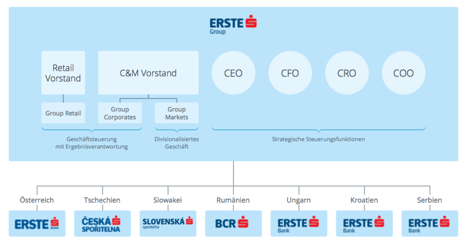 Erste Group Gruppenstruktur